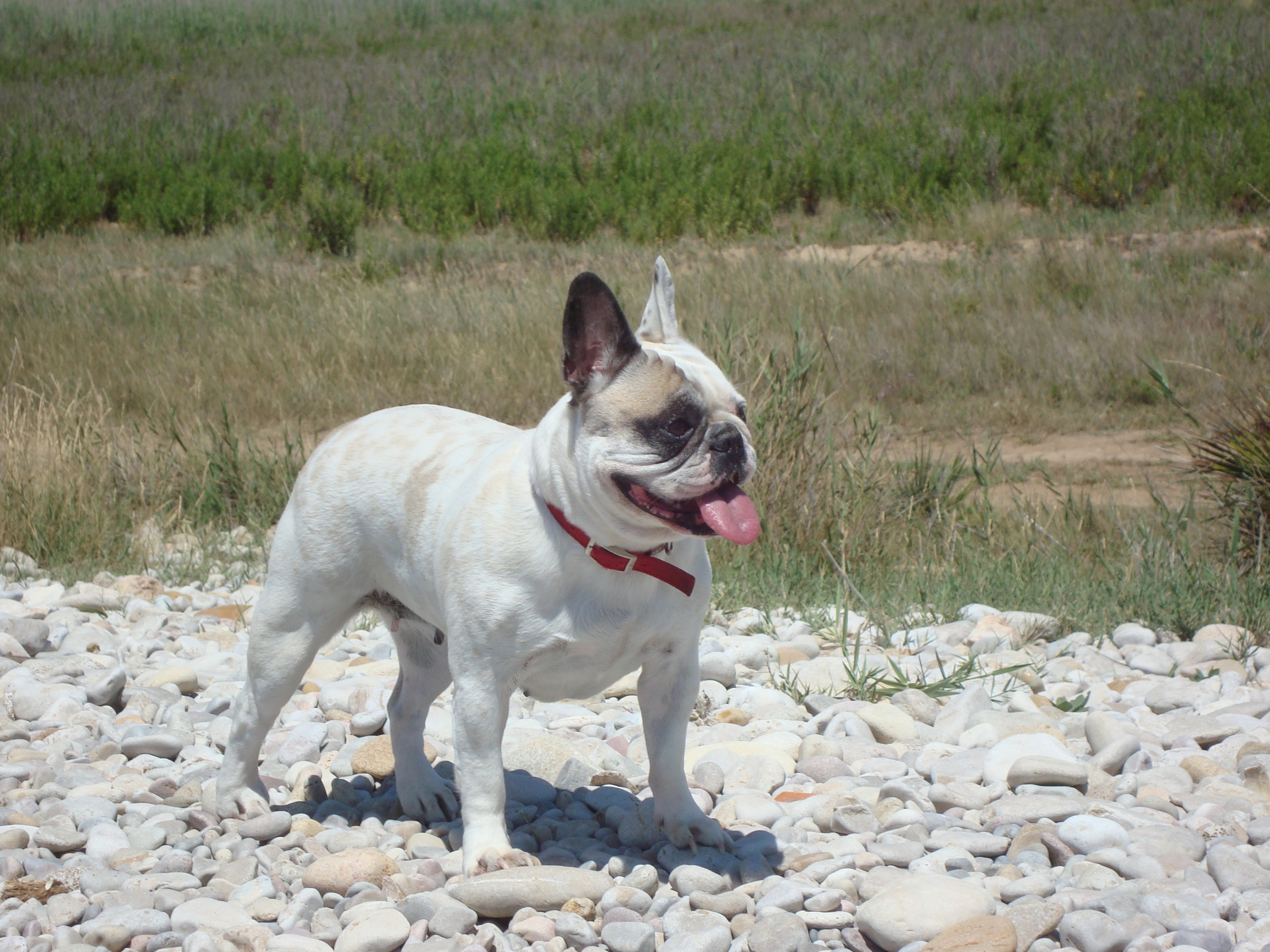 Perrita bulldog